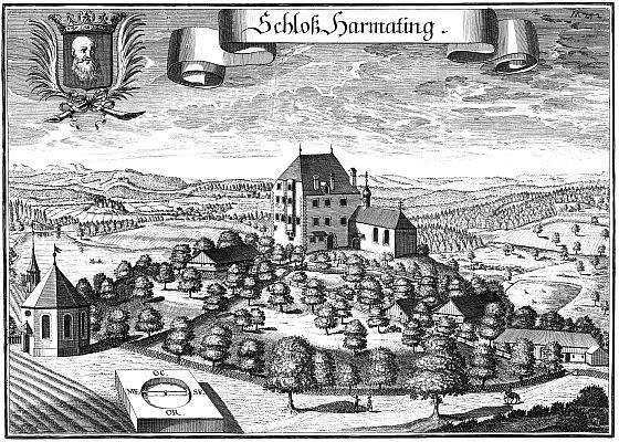 Schloss Harmating; Kupferstich von Michael Wening